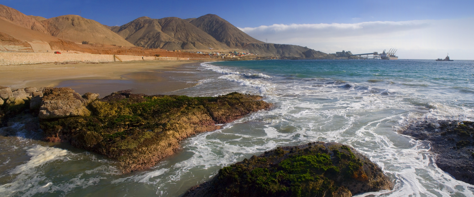 Playa Amarilla